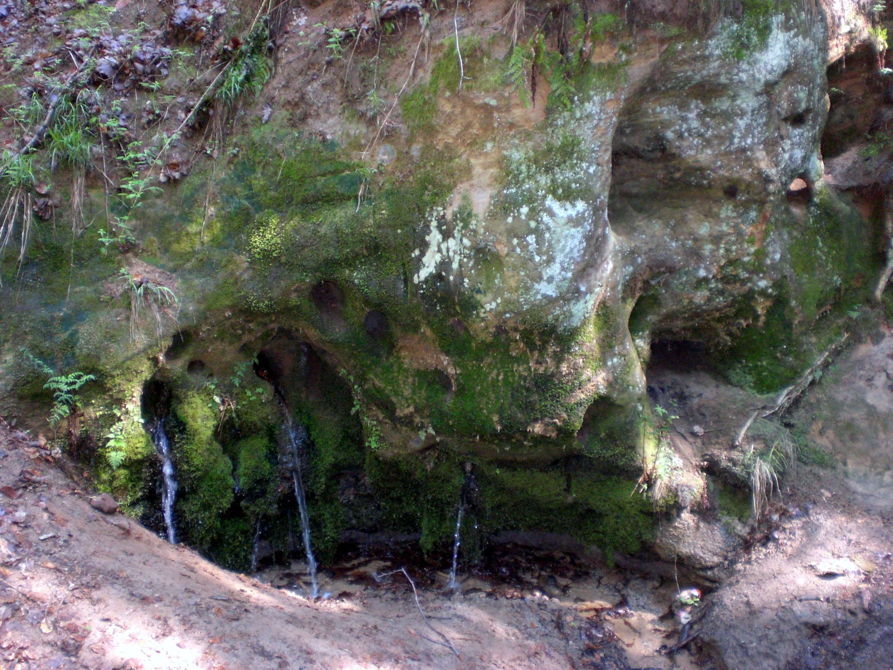 Sprosselbrunnen im Sommer